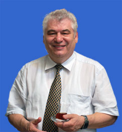 Мирон Грифф